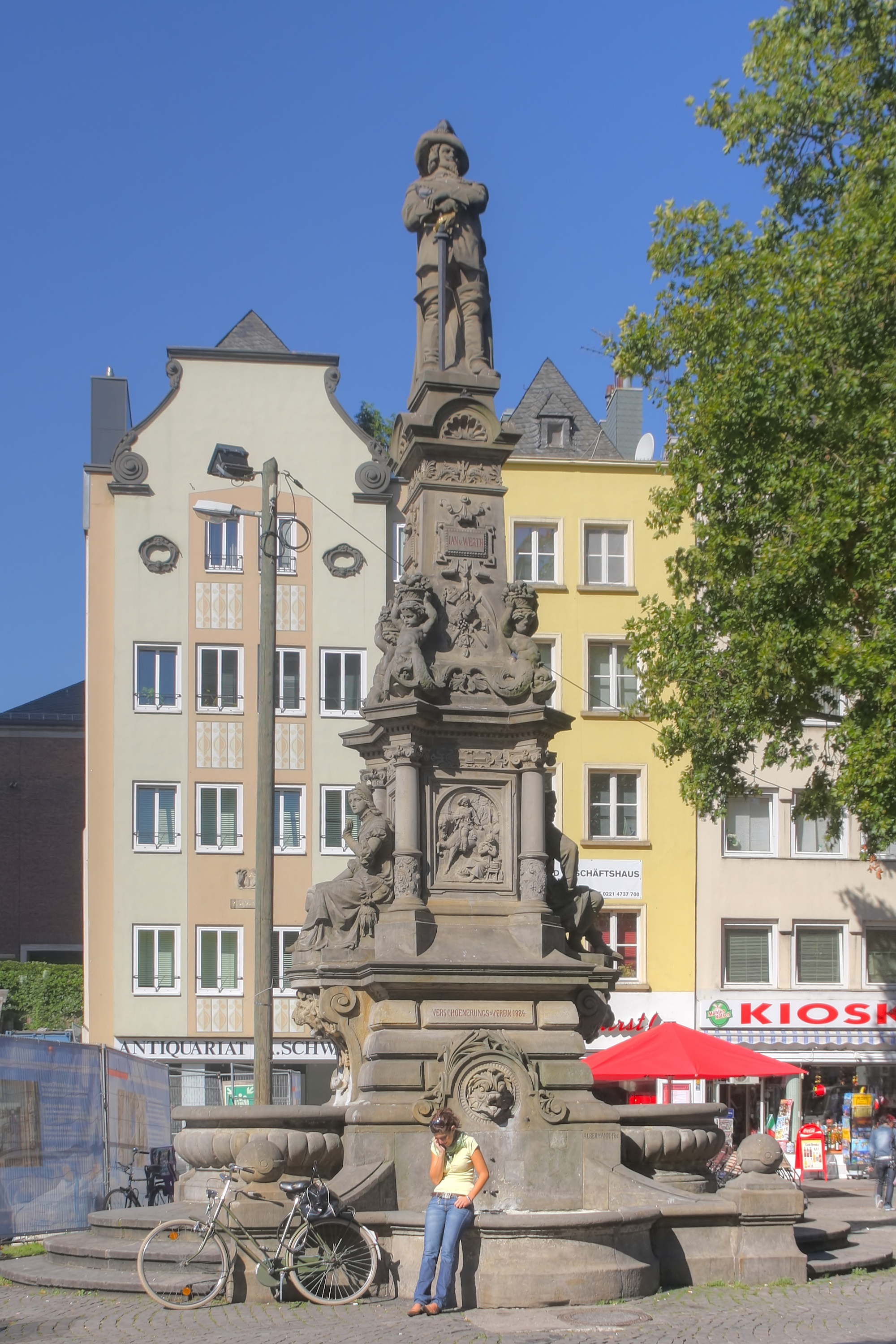 Jan-von-Werth-Brunnen, Alter Markt, Köln. Der 1884 erbaute Brunnen mit dem Denkmal für Jan von Werth wurde von Wilhelm Albermann gestaltet. This is a photograph of an architectural monument.